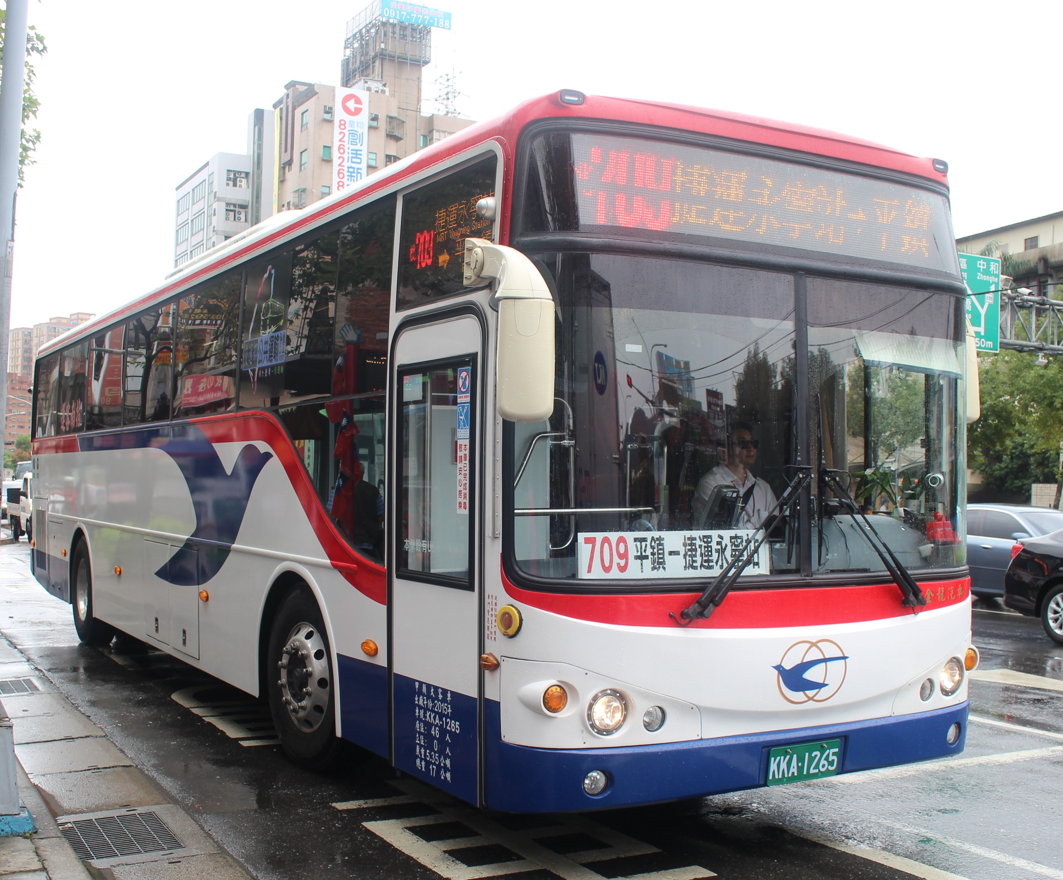 指南客運 KKA-1265 709